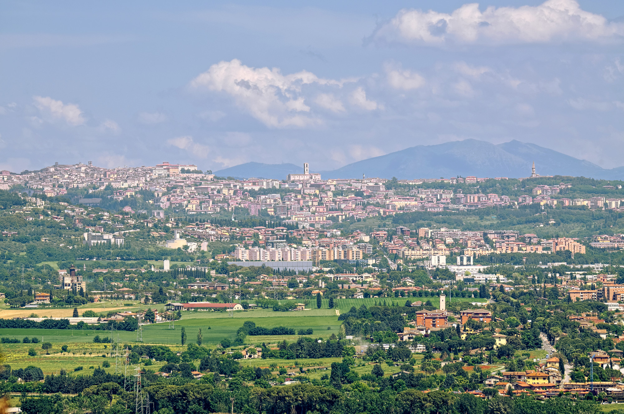 Perugia